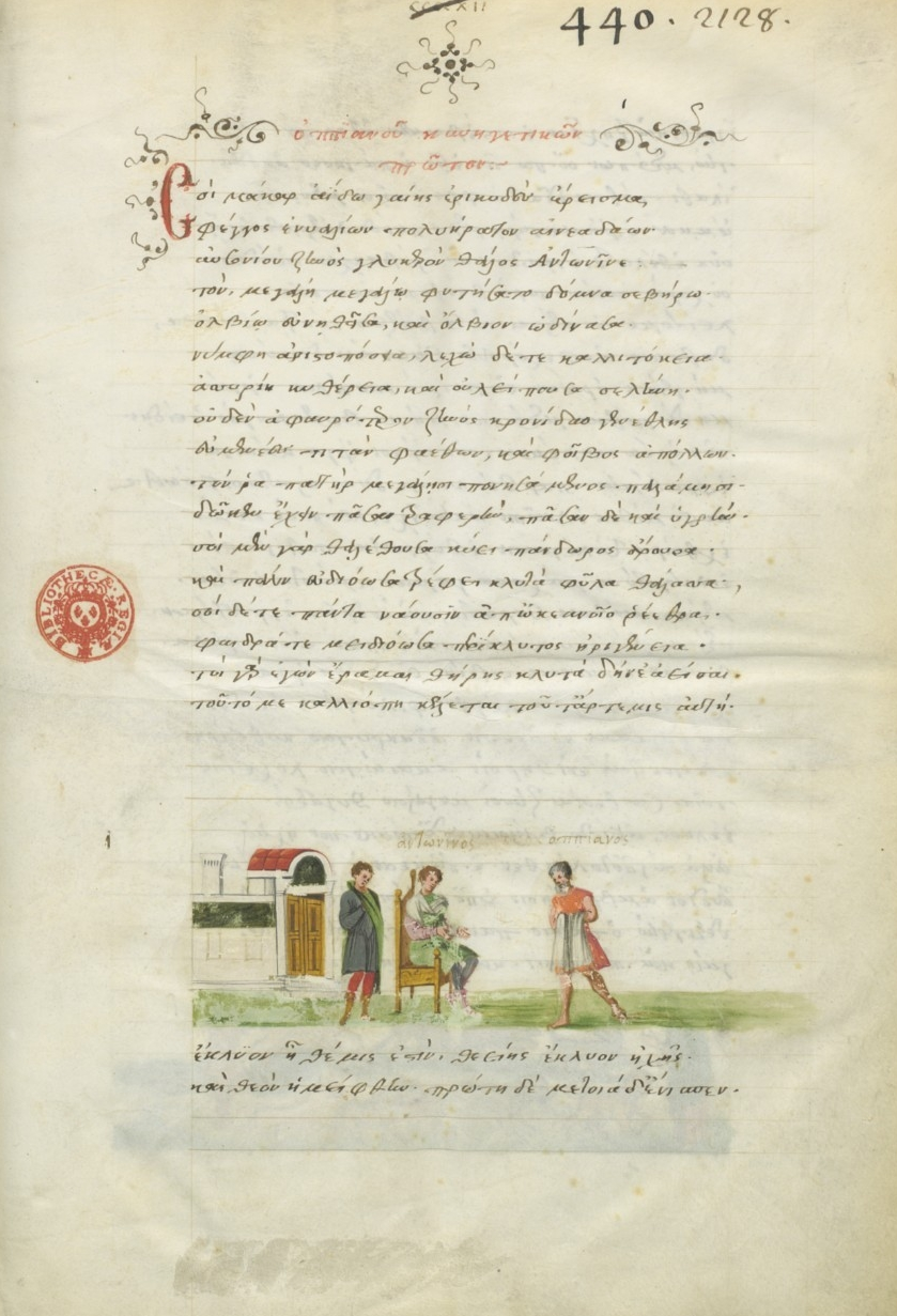 Oppian, Cynegetica. BNF MS grec_2736_f_1r